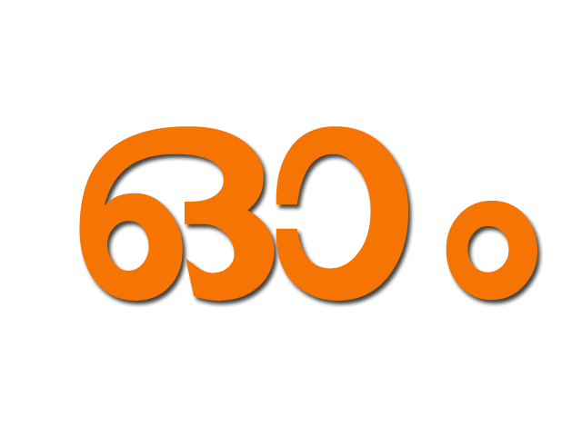 Ohm malayalam